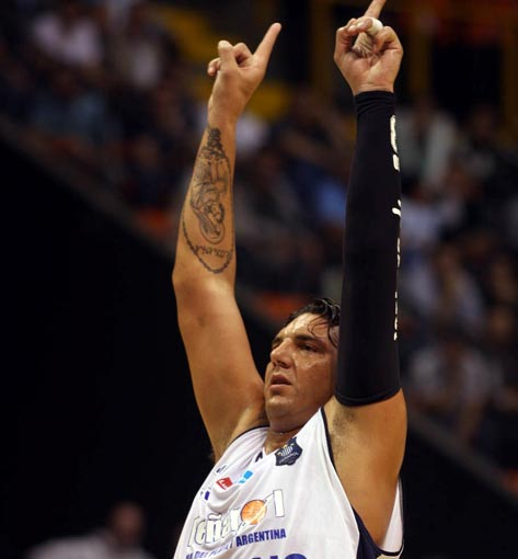 El jugador de básquet Román González realizando su habitual festejo cuando convierte tiros libres (un beso al cielo con una mano por cada tiro libre convertido)